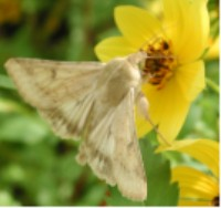 Apamea zea